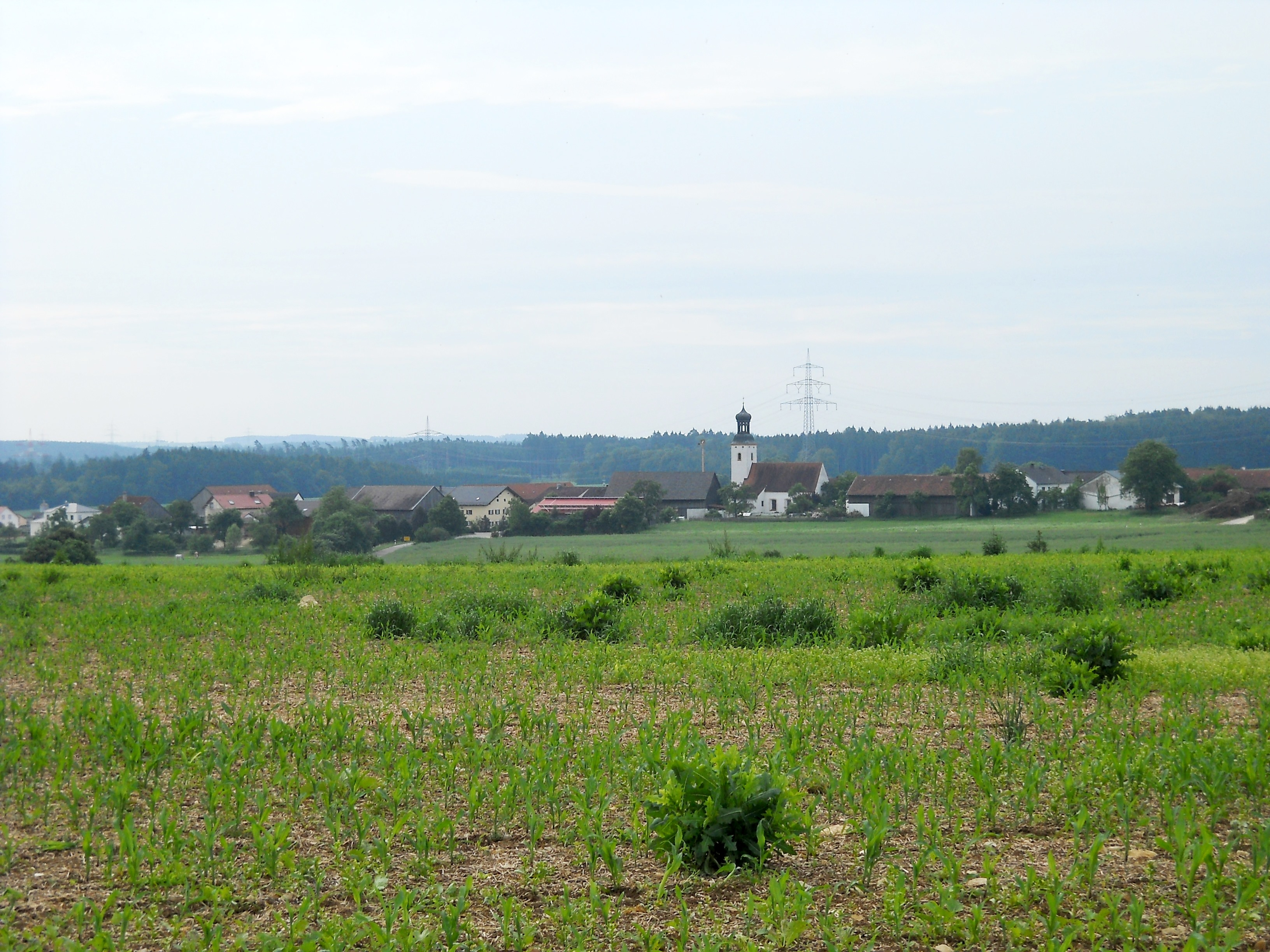 Wallfahrtsort Buchenhüll, Ortsteil von Eichstätt im oberbayerischen Landkreis Eichstätt